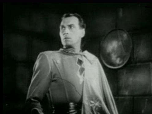 Screenshot da me realizzato dal trailer ufficiale del film Adventures of Captain Marvel (1941), disponibile sul sito [1]